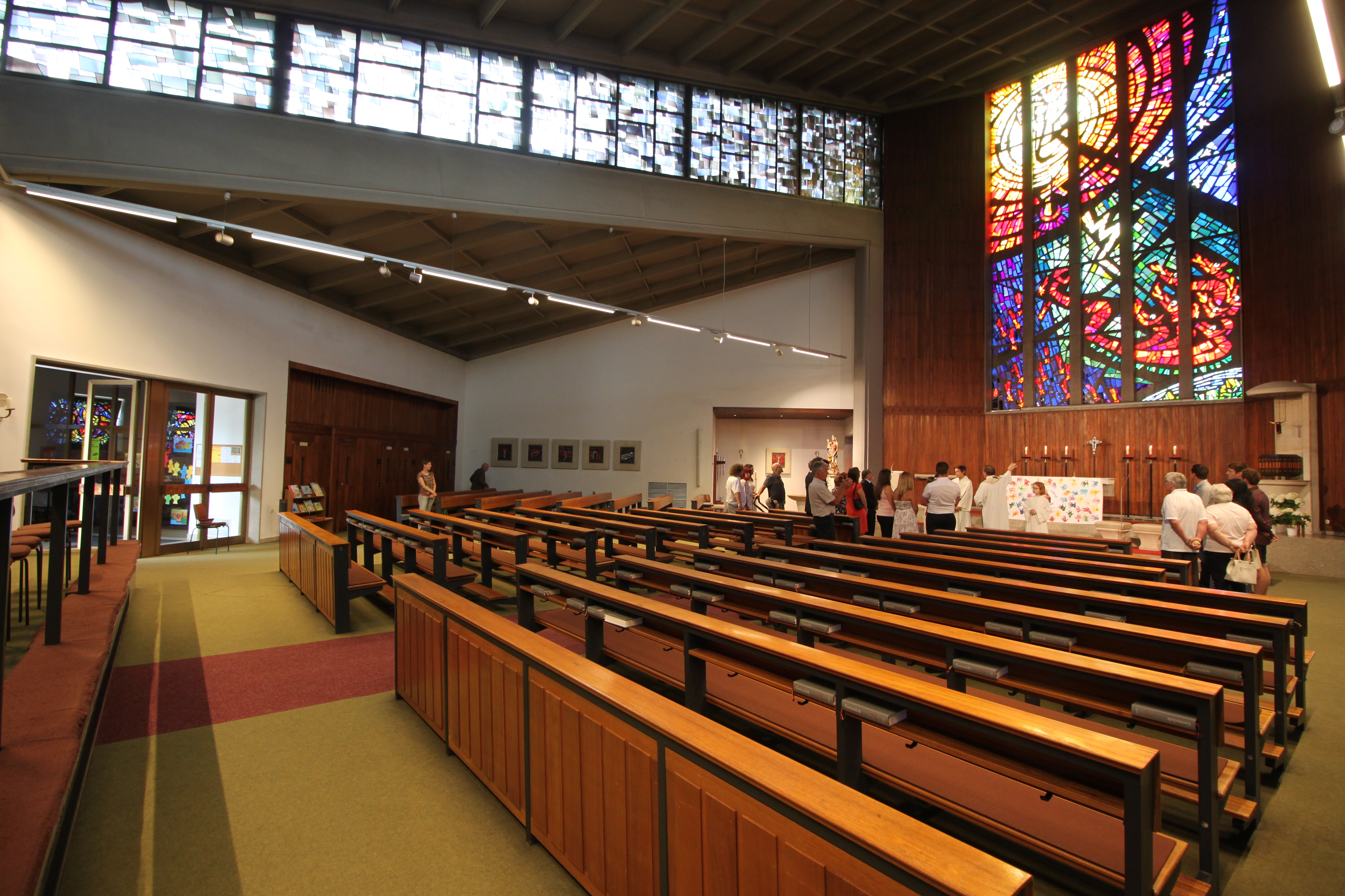 Filialkirche Gartenstadt in Hollabrunn, Kircheninneres, links hinten Türen zum Vorraum, Altarwand mit großem Glasfenster vom Maler Franz Deéd